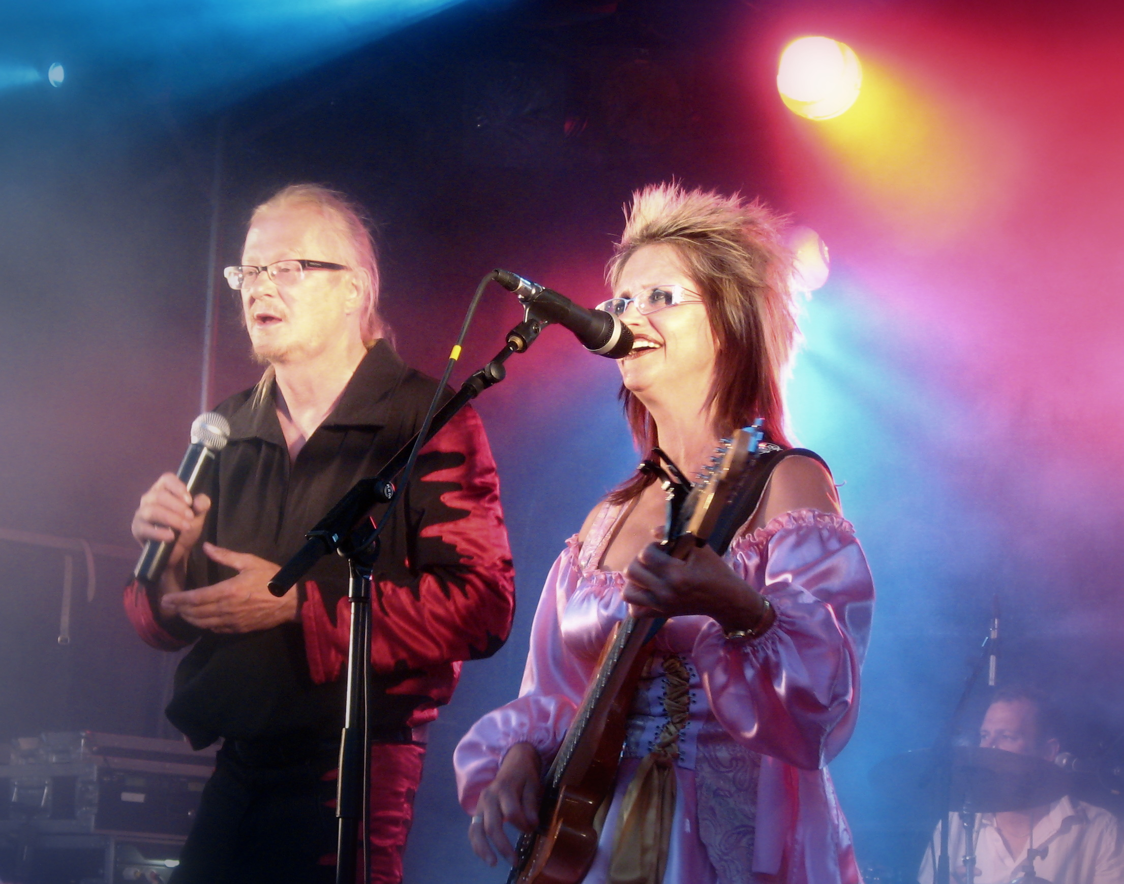 Sussi og Leo - Musik Under Trappen i Hirtshals, 2010